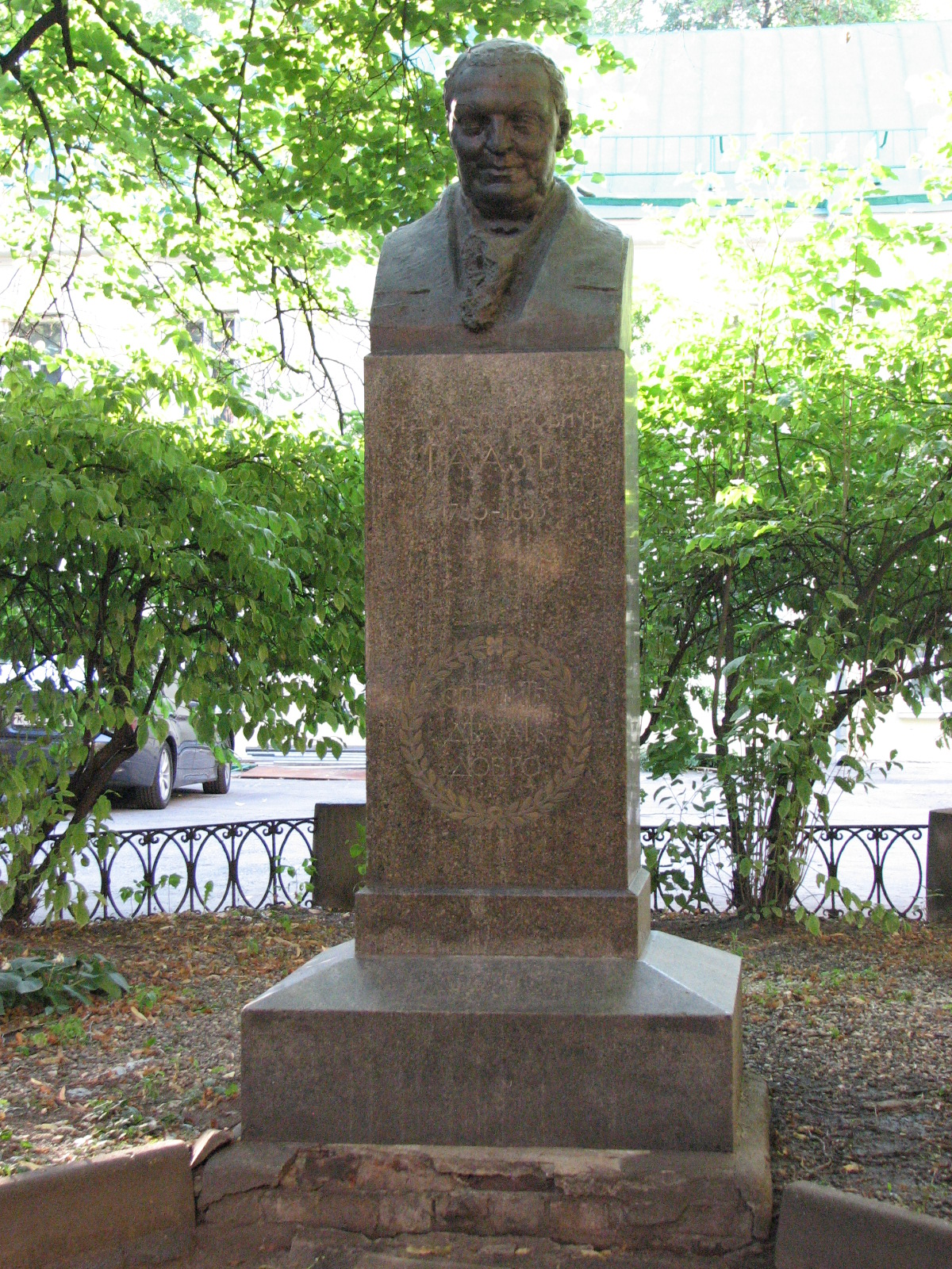 Бюст Ф.П.Гааза: Басманный, Центральный округ, Москва